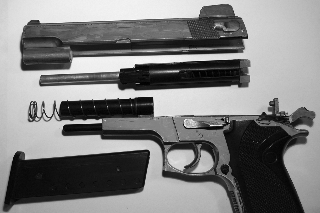 Eine Federdruck-Airsoftpistole, zerlegt in Baugruppen.